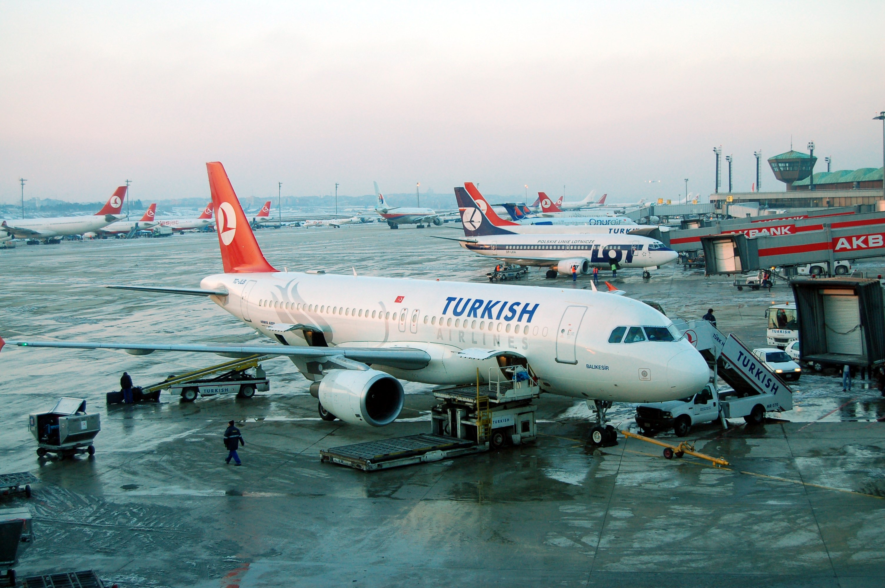 Bildbeschreibung: Istanbul Atatürk International Airport Turkish Airlines Airbus A320-200 (TC-JLB) LOT Polish Airlines Boeing 737-500 (SP-LKA) Quelle: Selbst fotografiert Nikon D50 Fotograf/Zeichner: Mücteba Karamustafa ( Datum: 29. Januar 2006